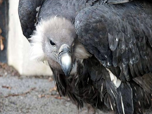 Bengalgeier (Gyps bengalensis)